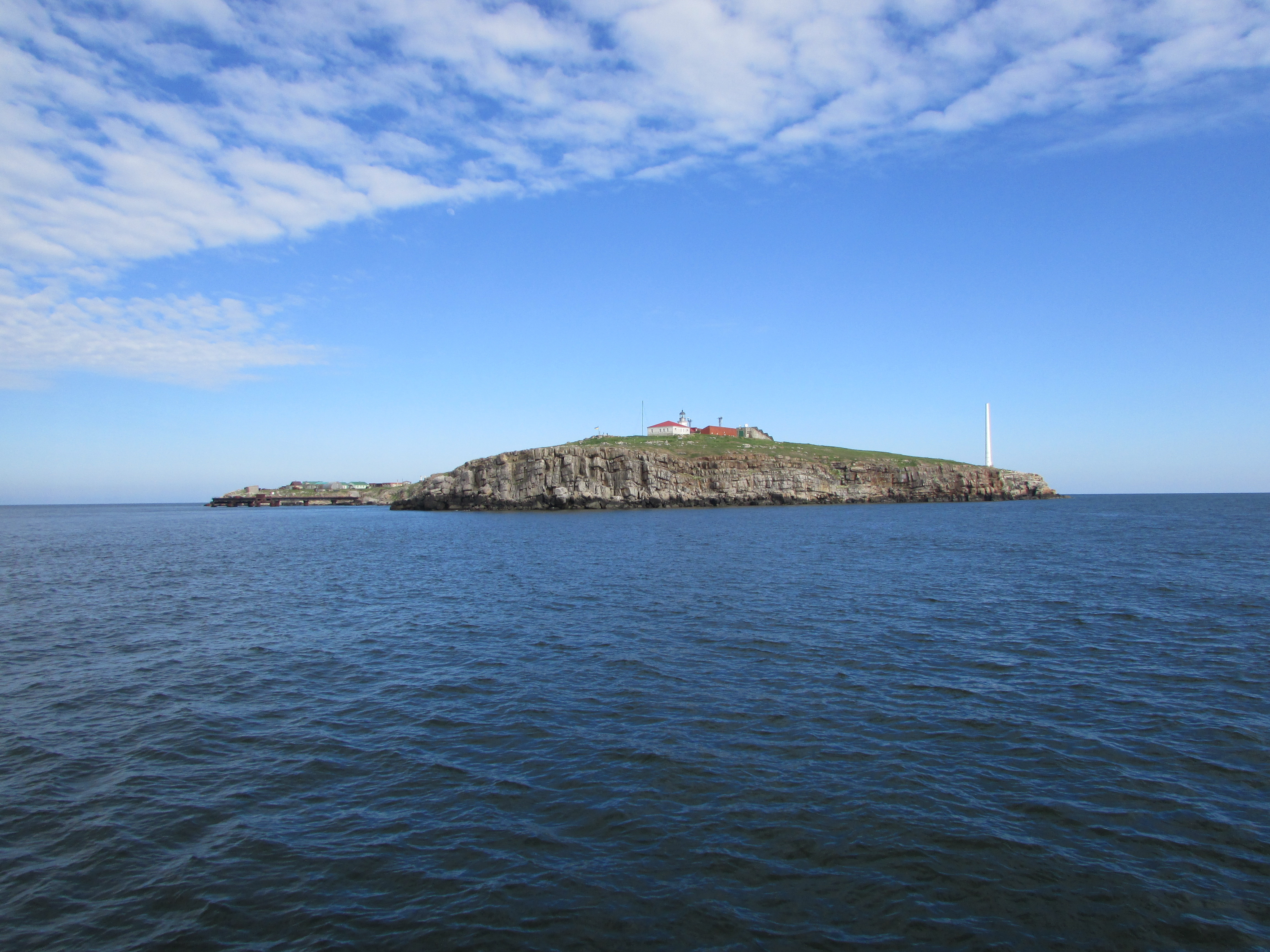 «Острів Зміїний», Кілійський р-н, о. Зміїний